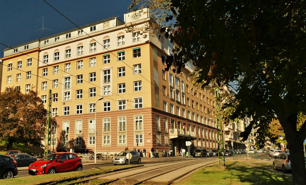 A Budapesti Kereskedelmi és Iparkamara központi épülete (Budapest, Krisztina körút 99.)